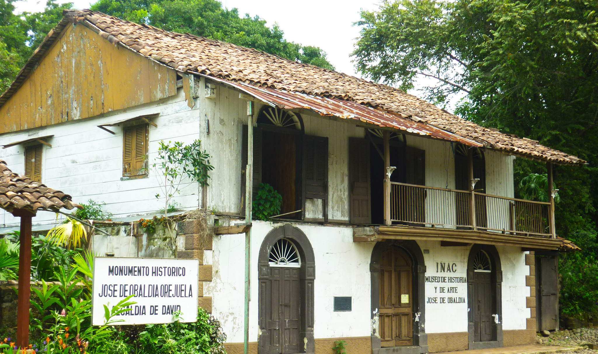 Residencia de Obaldía, Chiriquí, Panamá.